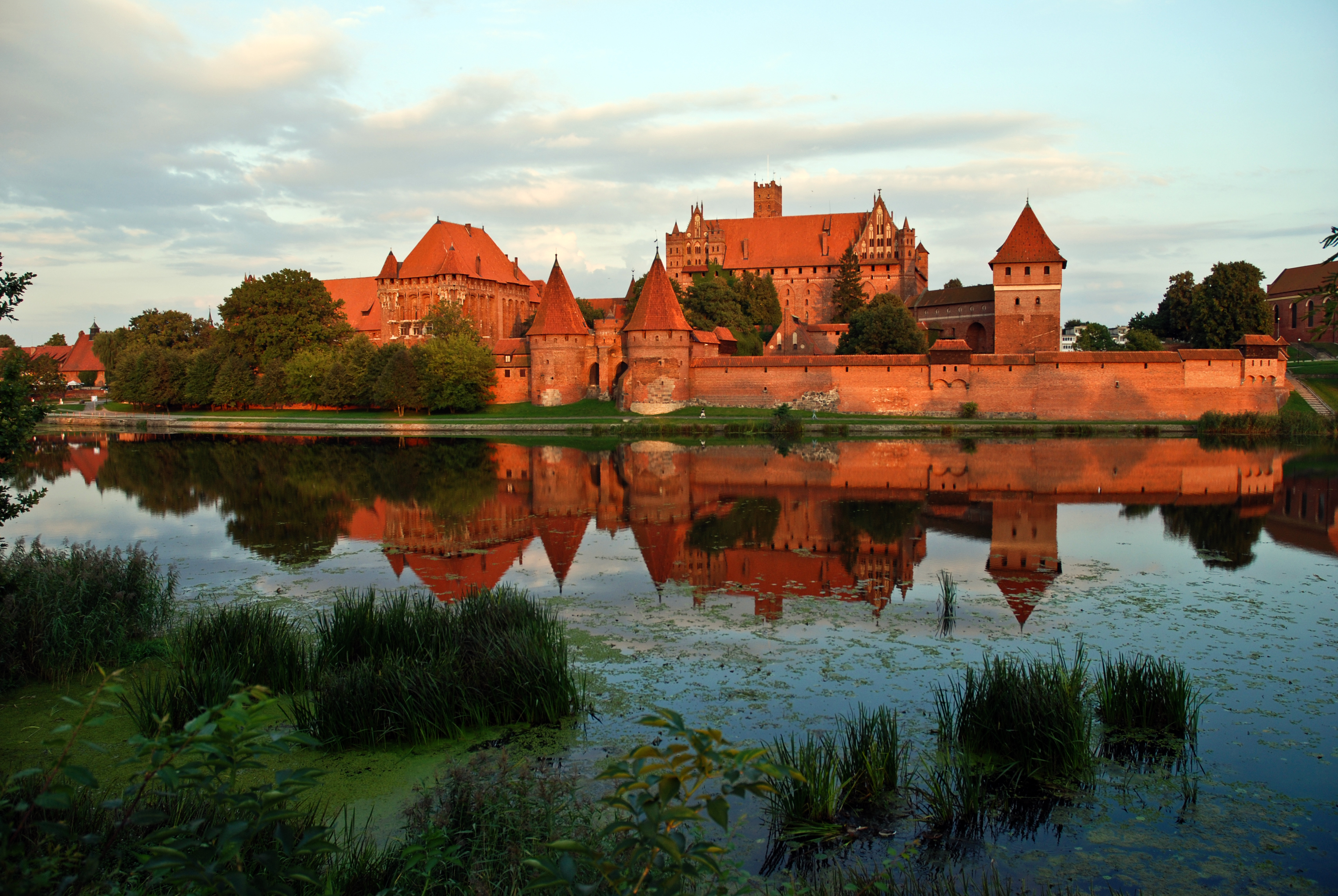 Malbork, zespół zamku krzyżackiego, XIII, XIX